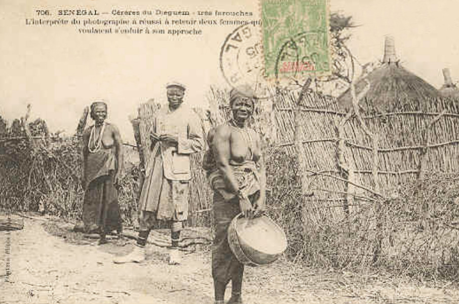 François-Edmond Fortier, Sénégal. Cérères du Dieguem. Afrique Occidentale - Sénégal.